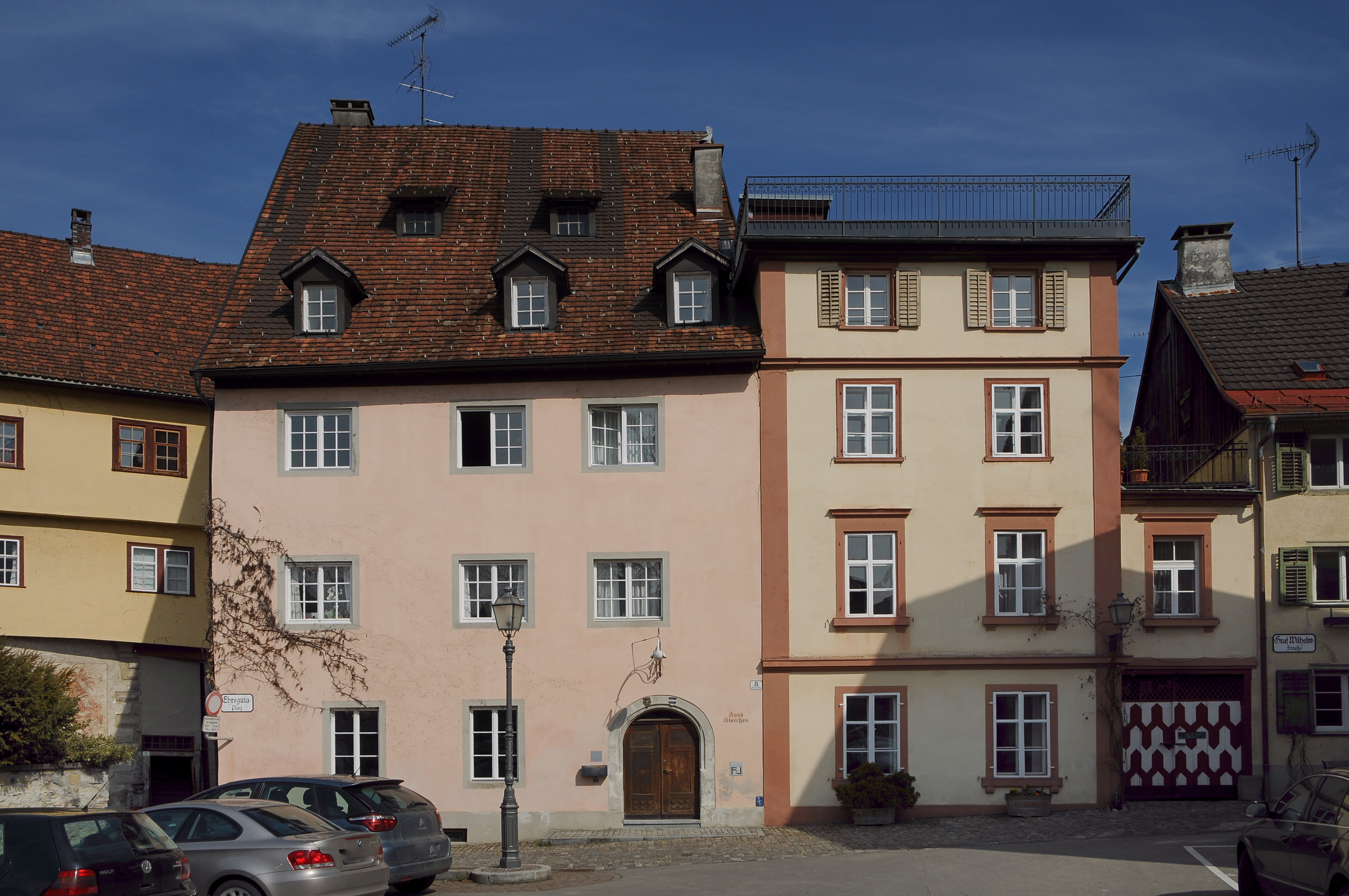 Wohnhaus am Ehregutaplatz Nr.8 (ehemaliges Gasthaus Zum Storchen) in der Oberstadt von Bregenz.